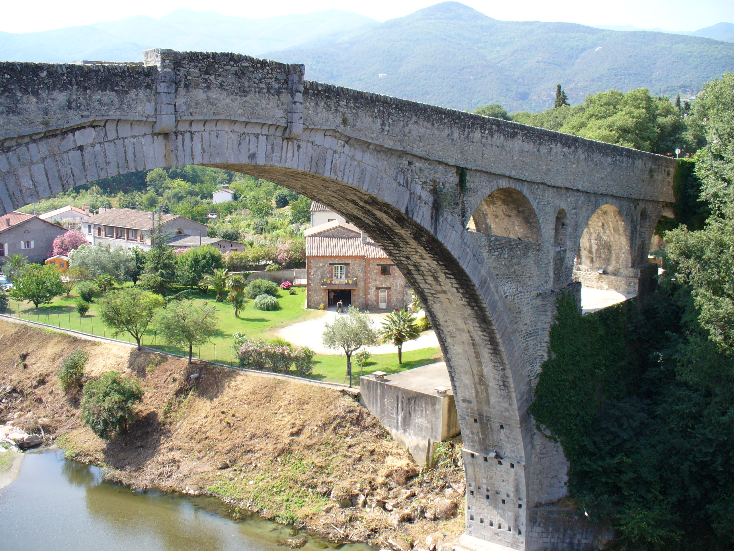 Die Brücke Pont du Diable in Céret, Frankreich